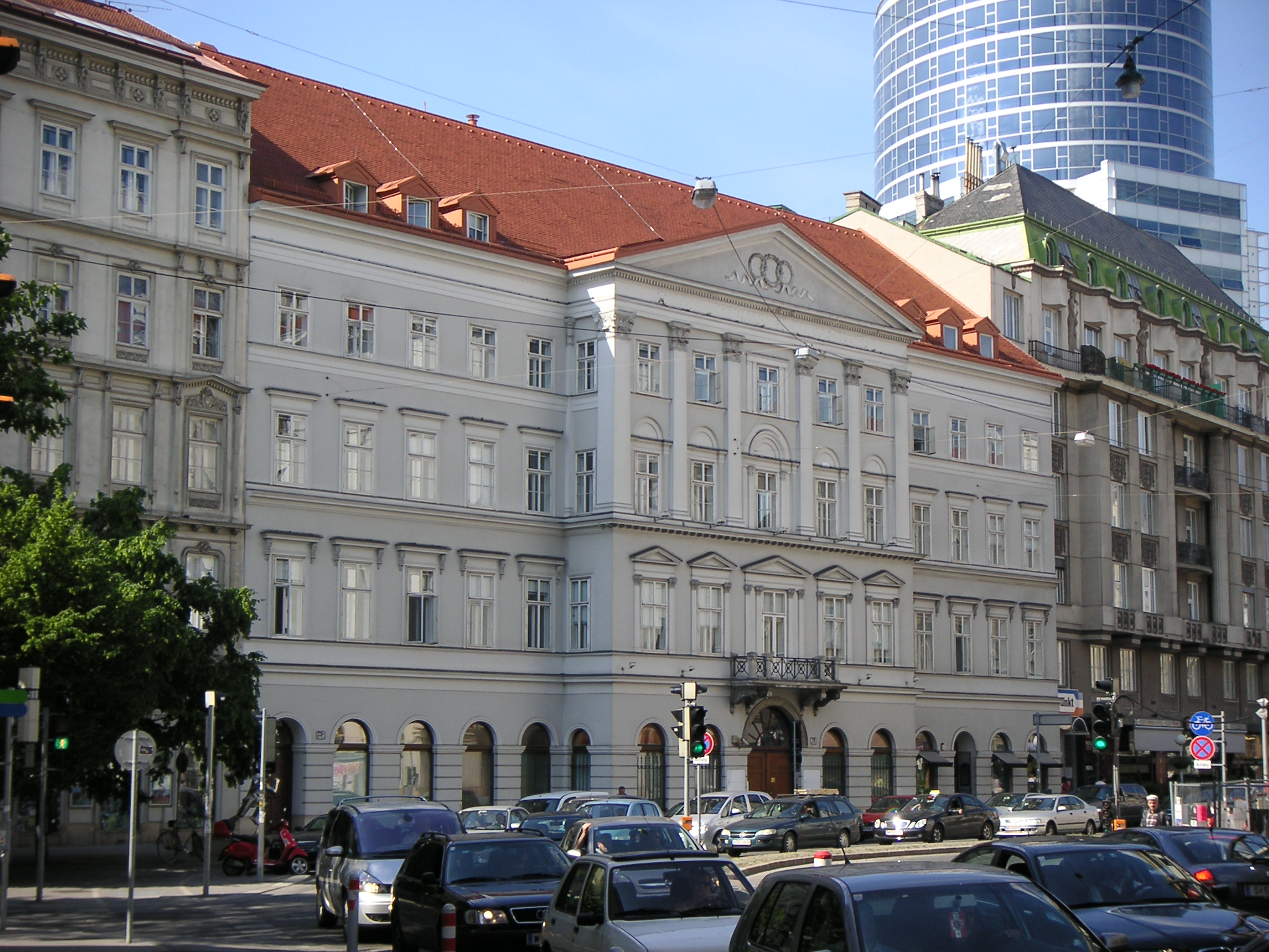 Haus Praterstraße 23, ehemaliger Sitz der österreichischen Finanzmarktaufsicht, in Wien